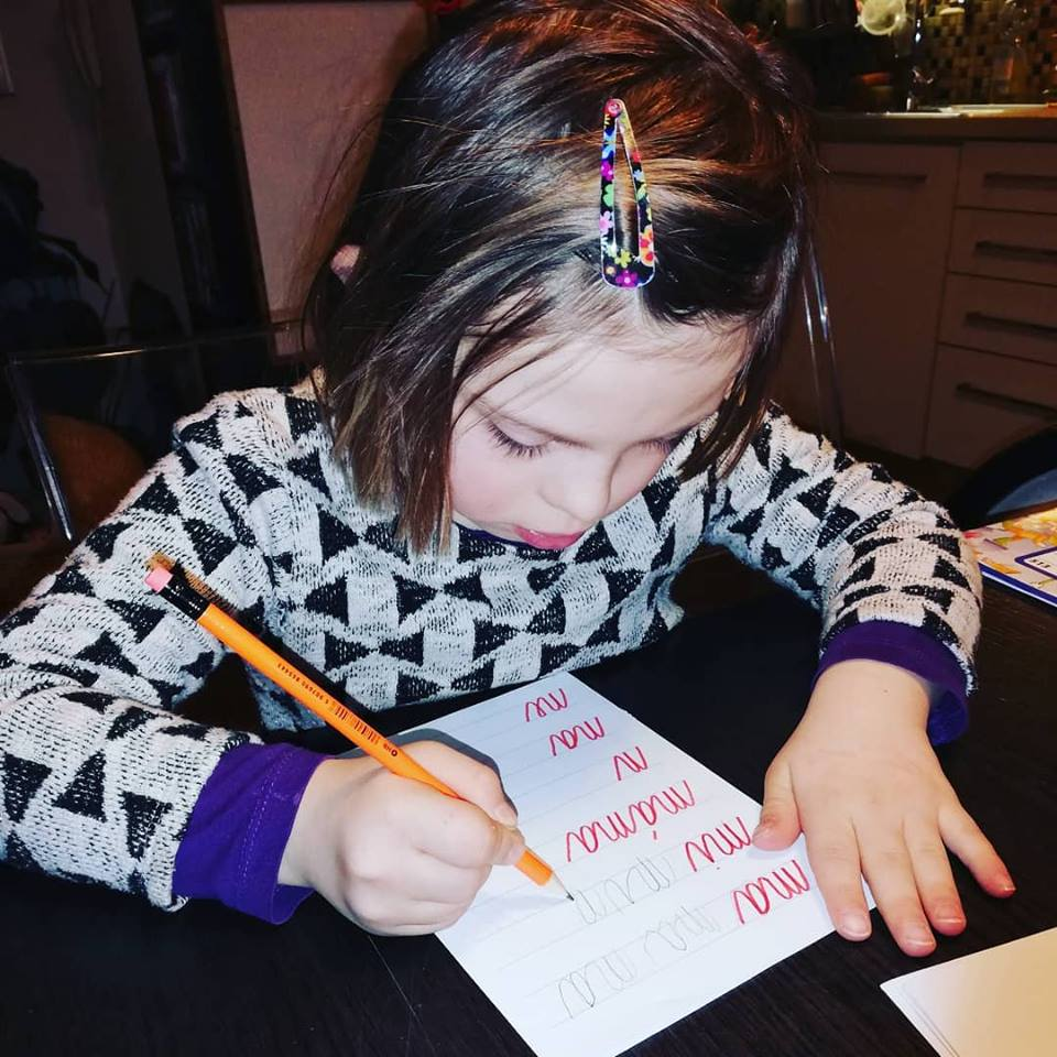 Domácí úkoly